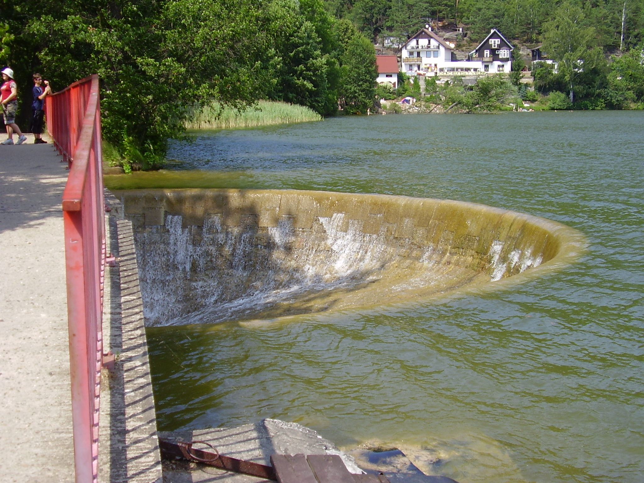 Outflow of lake Máchovo jezero